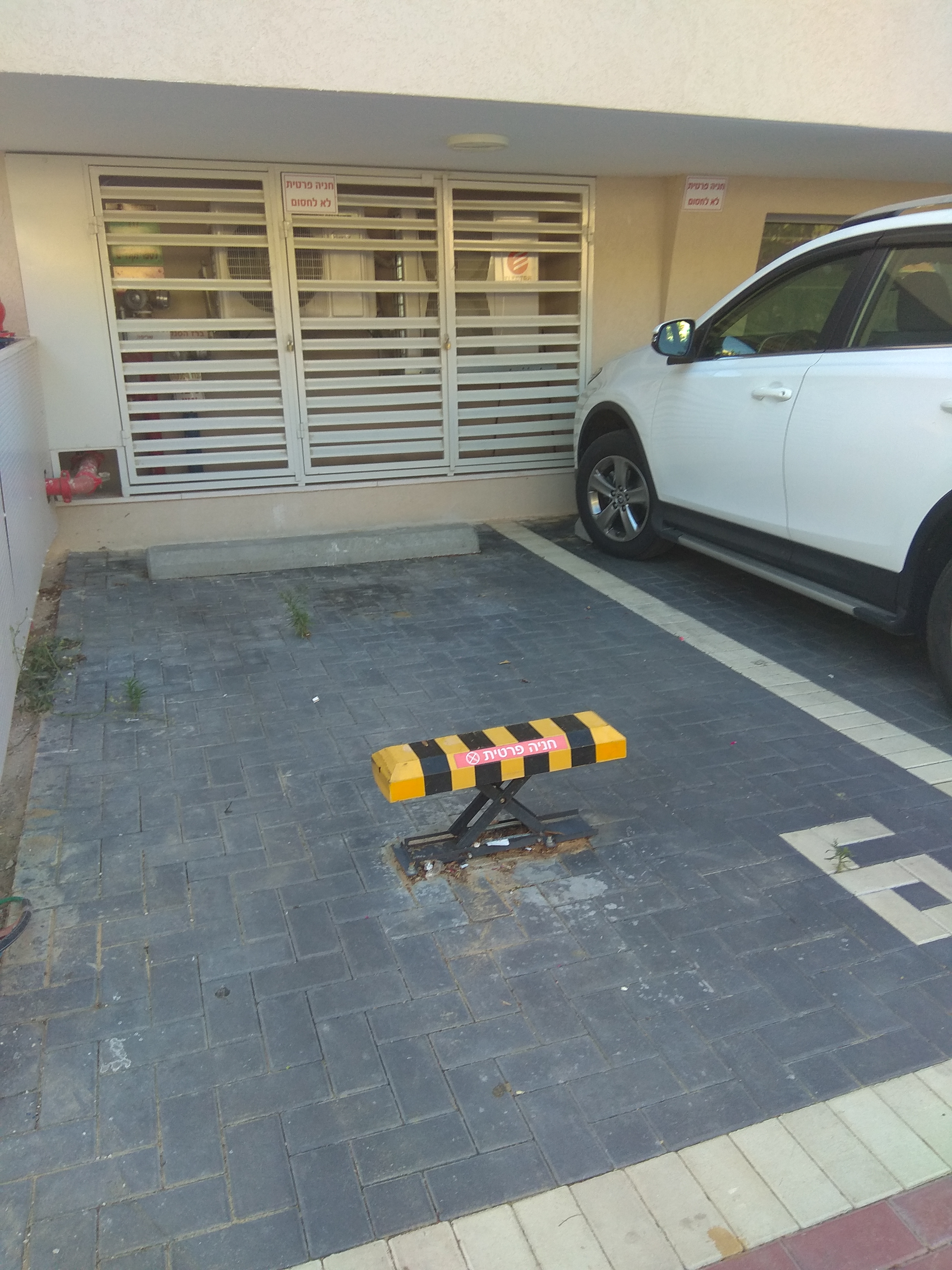 מחסום חנייה בבניין דירות